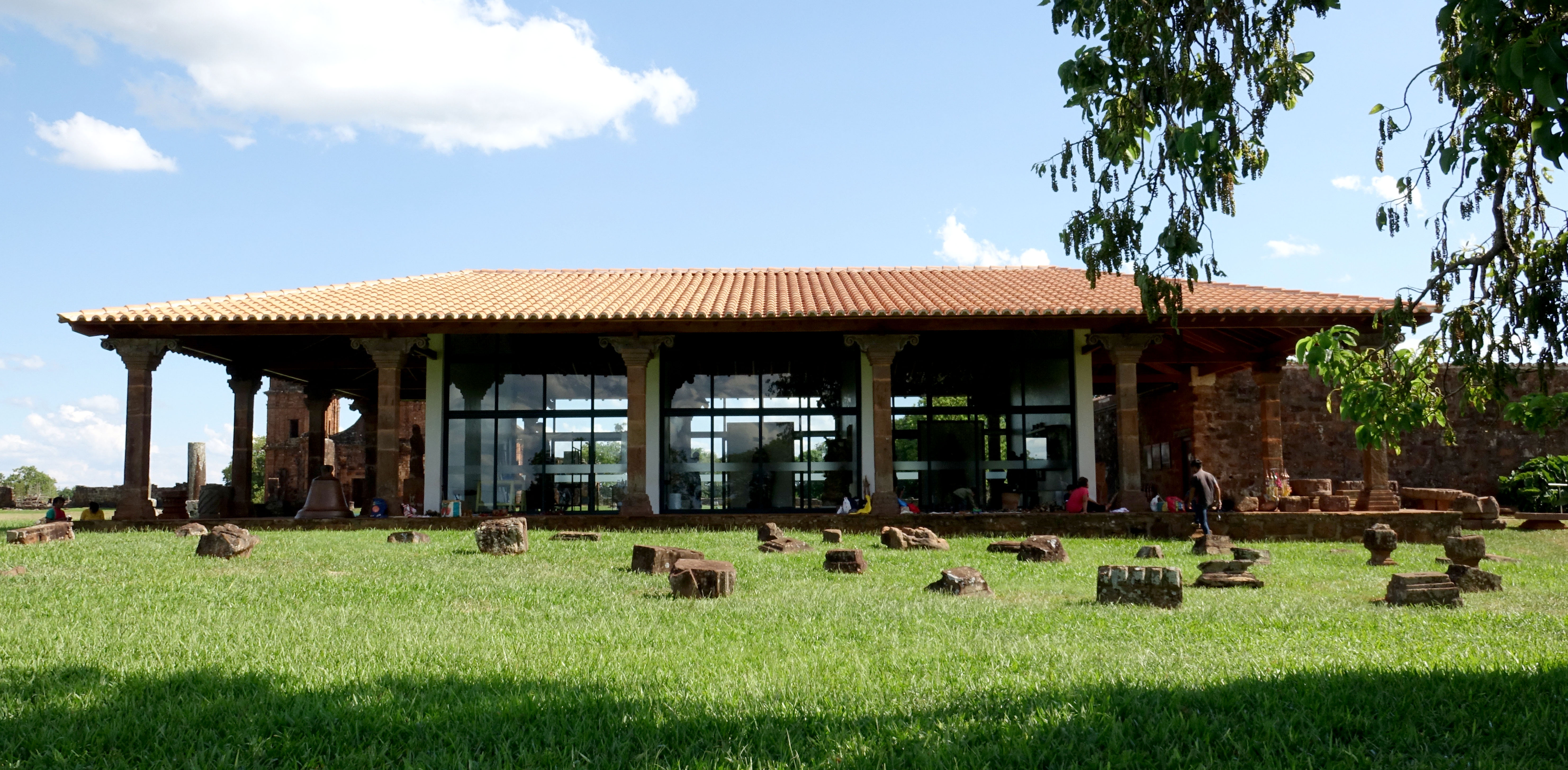 Fachada do Museu das Missões.